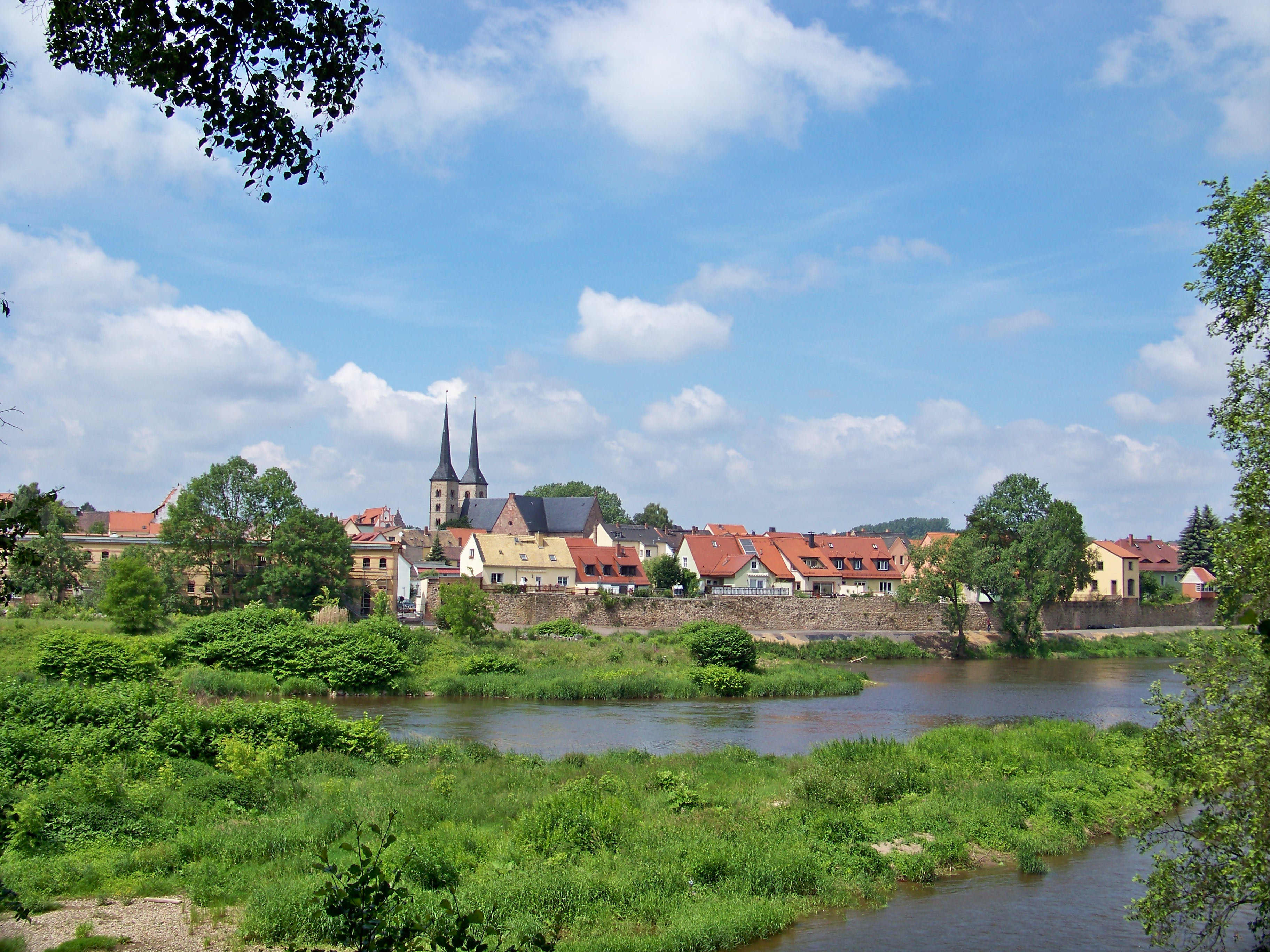 Die Stadt Grimma vom gegenüberliegenden Ufer der Mulde gesehen